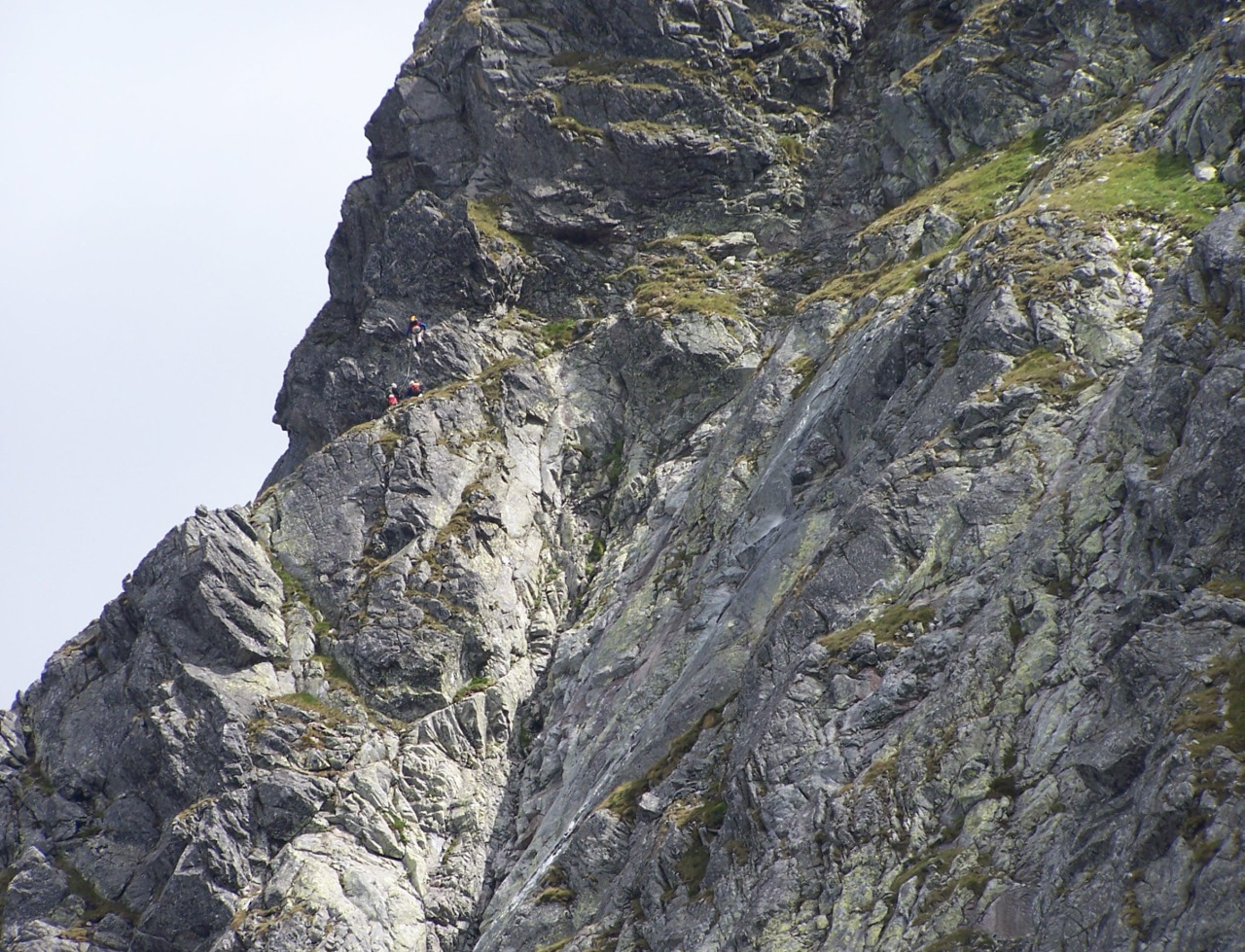 Północna ściana Świnicy z fragmentem Świnickiej Ławki